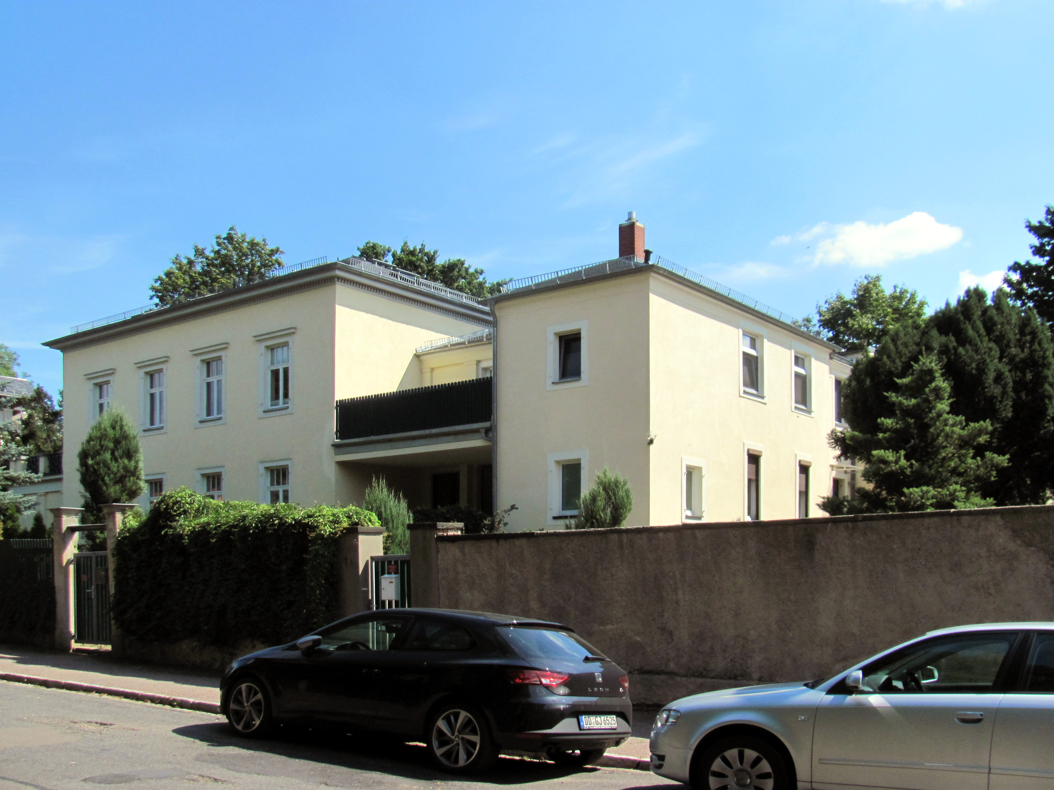 Radebeul, Villa „Sibi et Amicis“, Nebengebäude Nr. 1a